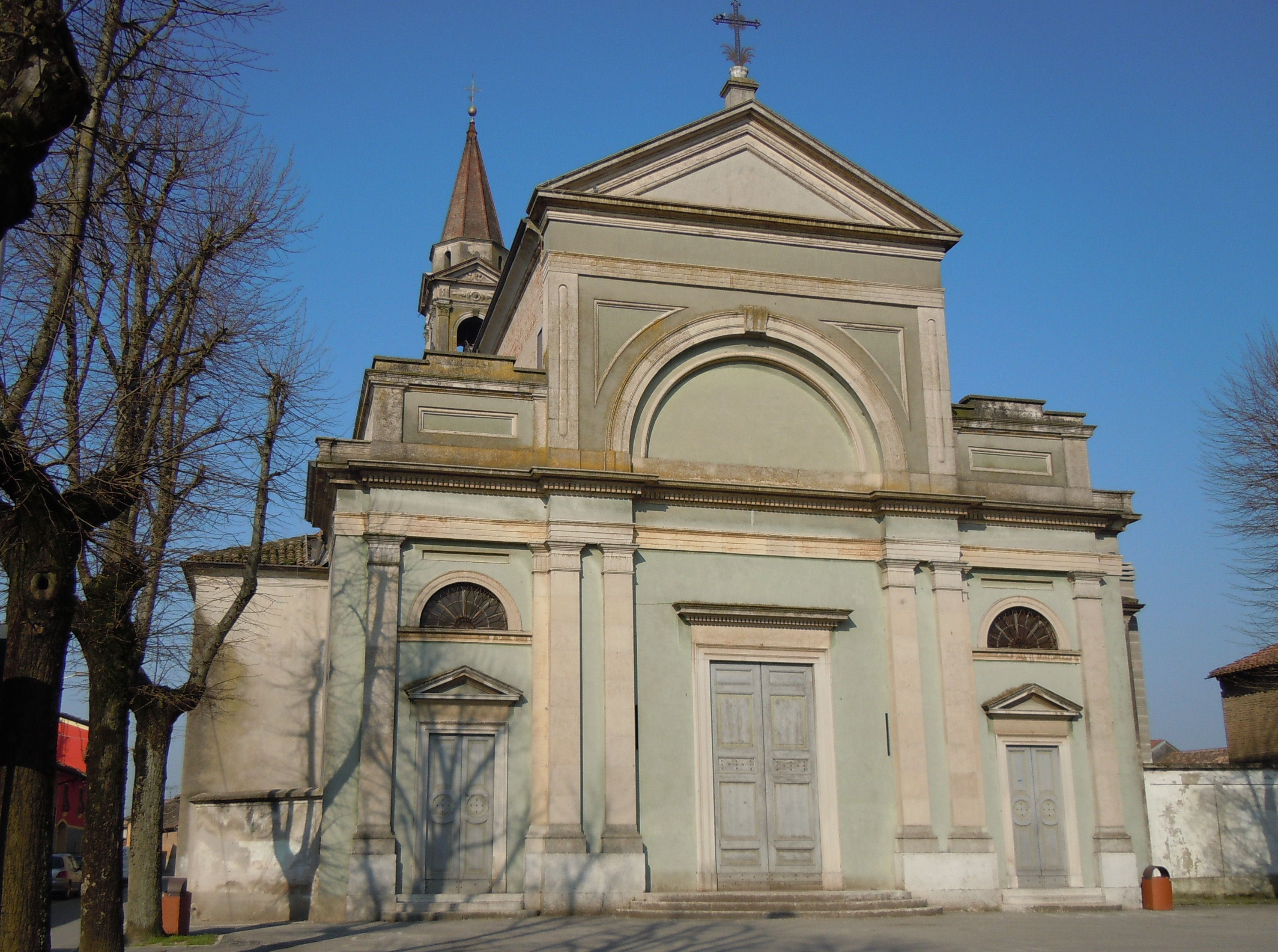 Calvatone, chiesa parrocchiale.